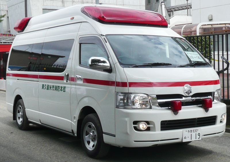 東久留米市消防本部の救急車。